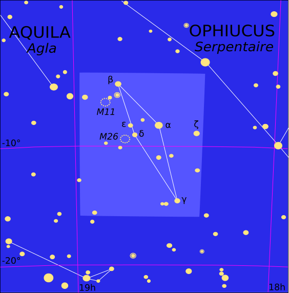 Representacion de la constellacion de l'Escut de Sobierski.